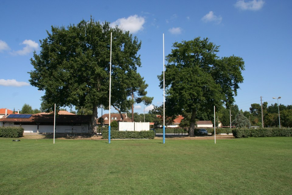 Stade de football australien des Bordeaux Bombers, St Médard en Jalles, Gironde, France